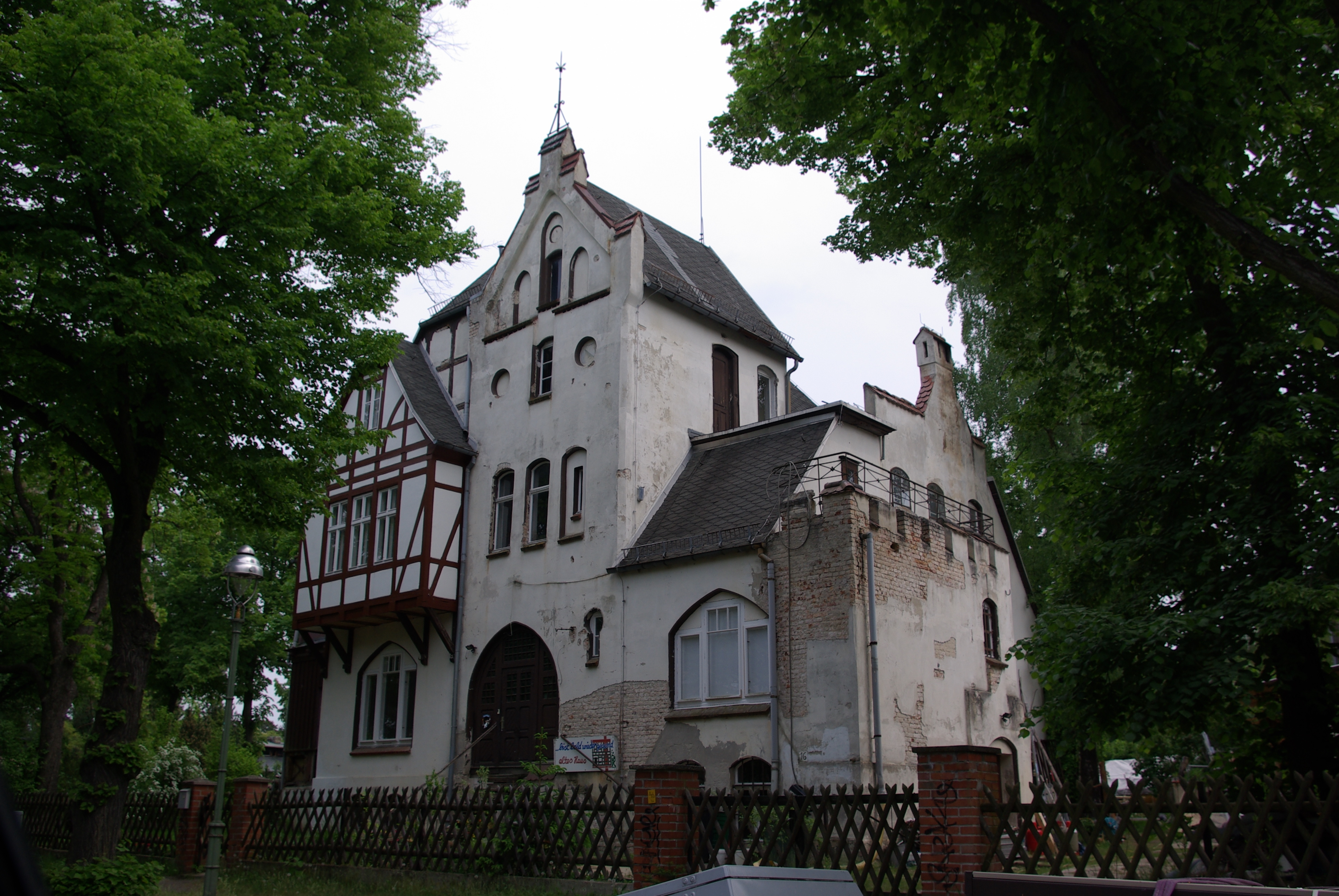 Schmöckwitz in Berlin. Das Haus in der Straße Schappachstraße 16 steht unter Denkmalschutz.